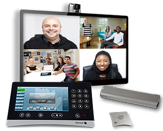 Système de visioconférence avec caméra PTZ, dalle tactile, codec et micro StarLeaf GT Mini 3330